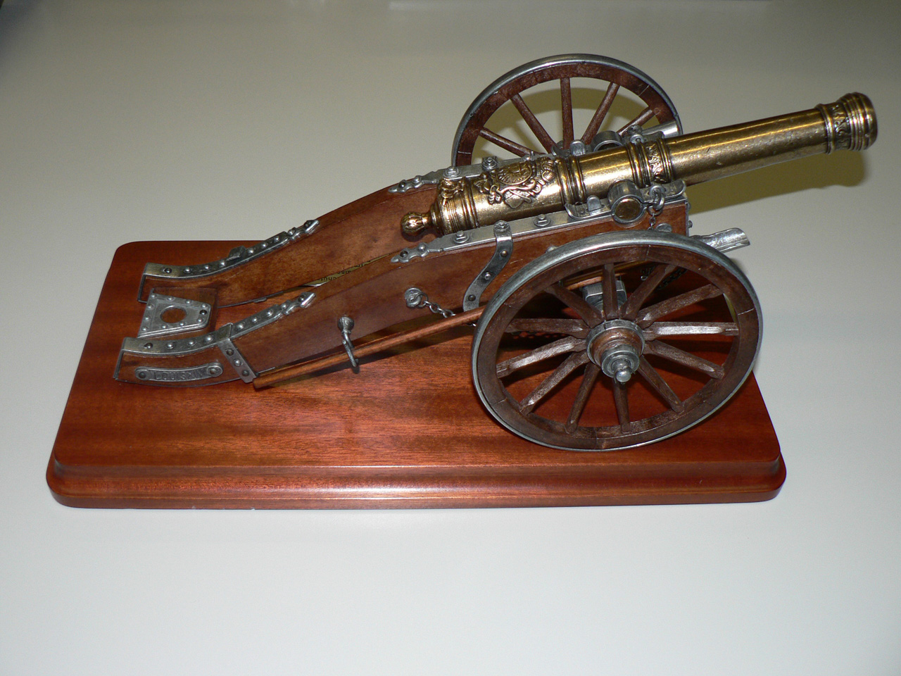 Torjägerkanone des Kicker-Sportmagazin zur Ehrung des Torschützenkönig der Fußball-Bundesliga (siehe auch Liste der Torschützenkönige der Fußball-Bundesliga